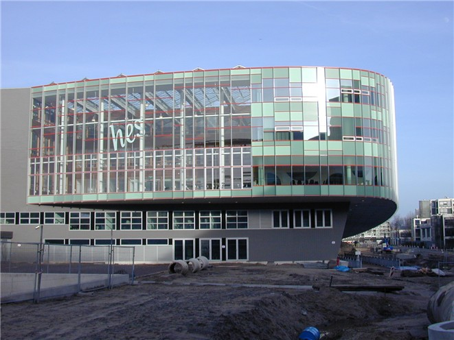 Lokatie Fraijlemaborg van de HES Amsterdam